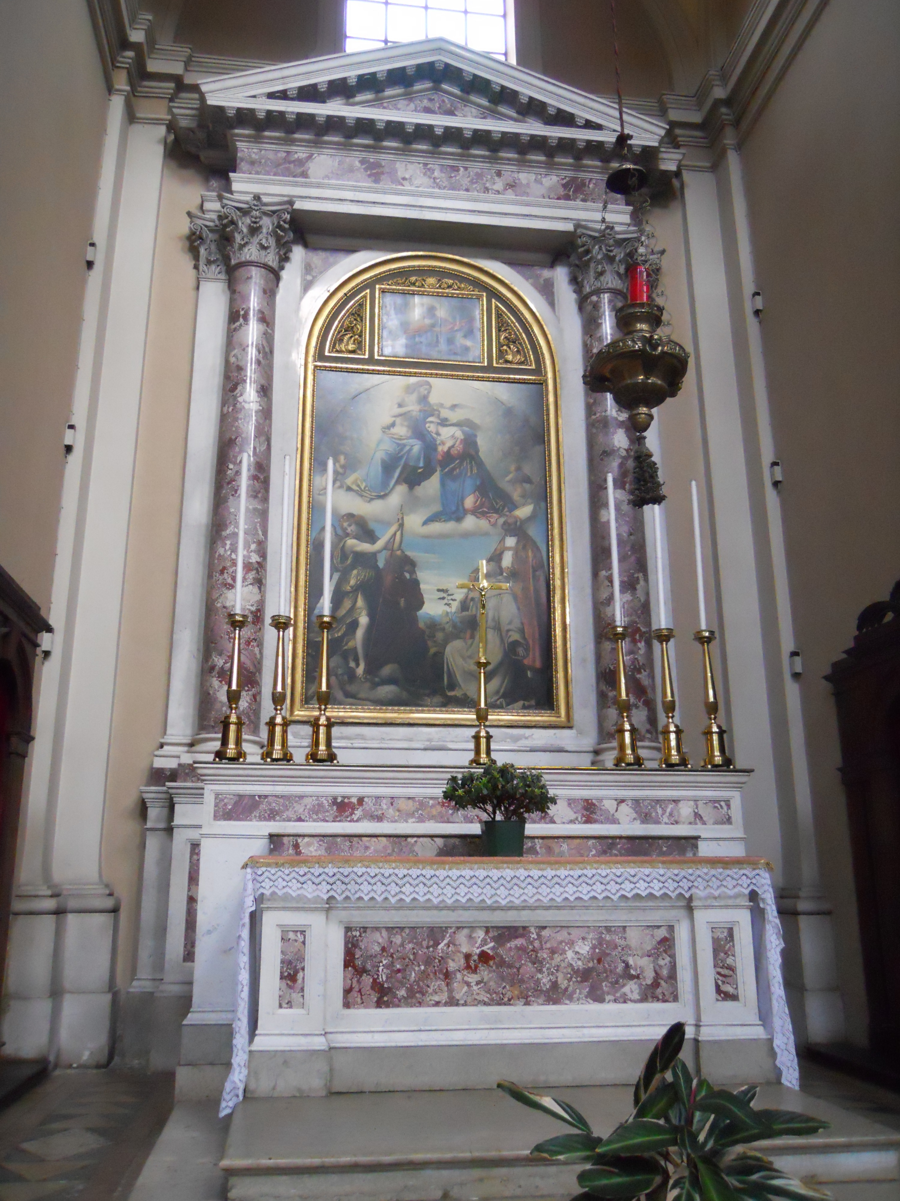 altare dell'incoronazione della vergine (chiesa dei santi nazaro e celso - Brescia).jpg